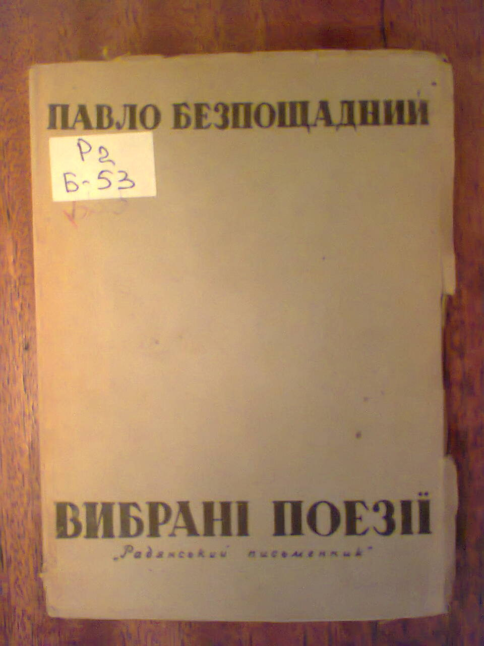 Безпощядний Павло "Вибрані поезії" 1930xx